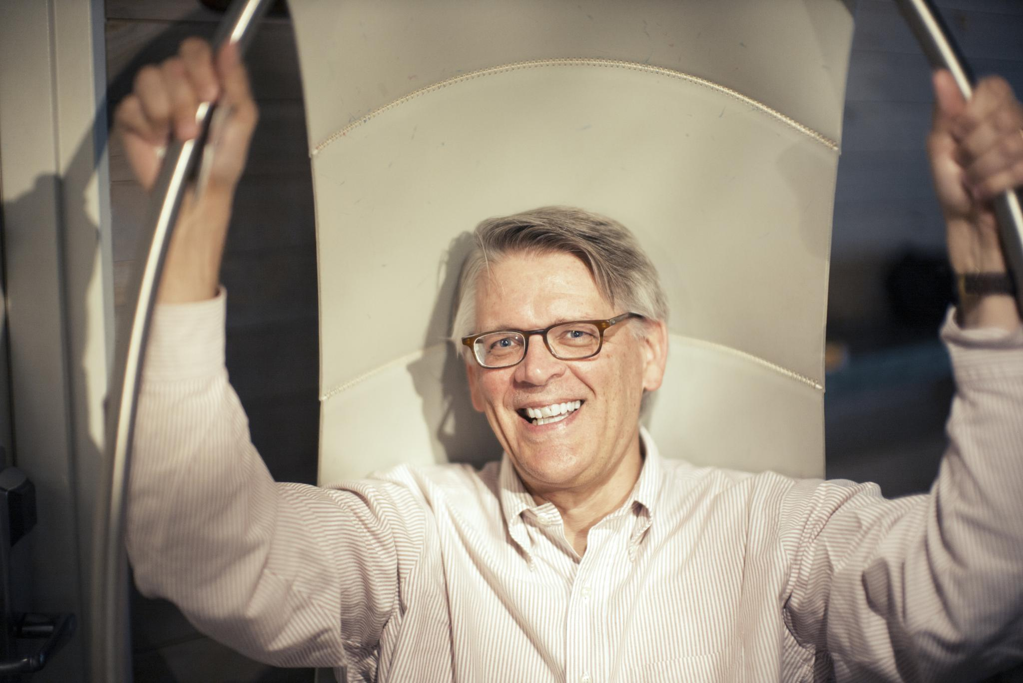 Tom Eisenmann